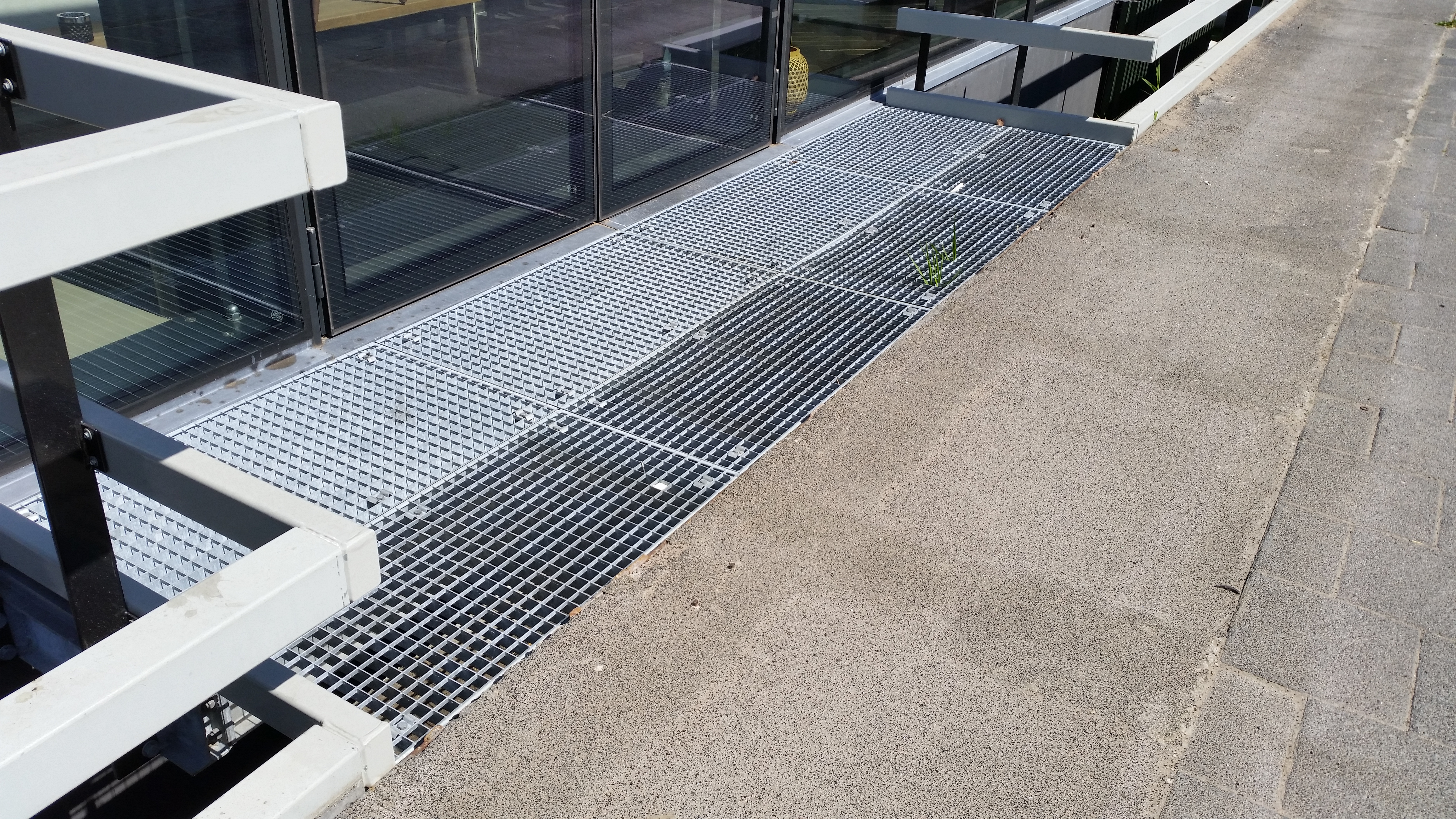 Impressie van Brug 1010 in de Bijlmerdreef over het Abcouderpad, Amsterdam-Zuidoost. Aan de brug is middels kleine brugjes een restaurant gekoppeld.